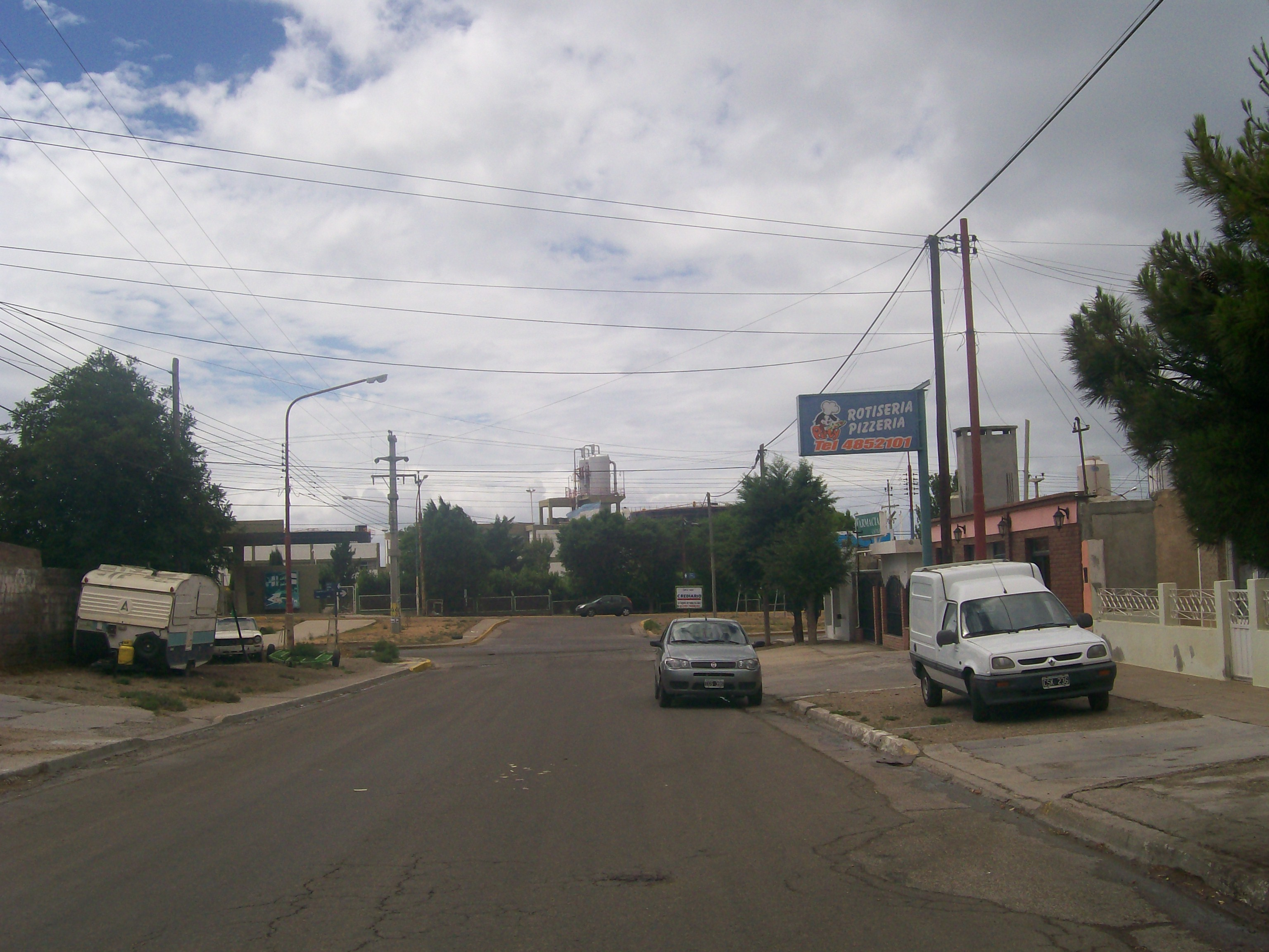 Vista a la calle Rosas, Bo. Parque, de fondo la UNPA